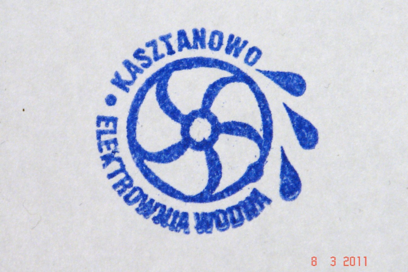 praca własna - logo: Elektrownia Wodna Kasztanowo autor: Henryk Janowiak /właściciel MEW Kasztanowo/